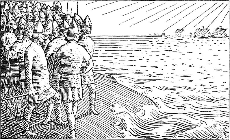 Halfdan Egedius: Illustration for Olav Trygvasons saga. Snorre 1899-edition. «Høvdingerne ser paa Holmen Olavs Skibe seile forbi.» nb: «Høvdingene ser fra holmen skipene til Olav seile forbi.» nn: «Høvdingane på holmen ser skipa til Olav segle framom.»